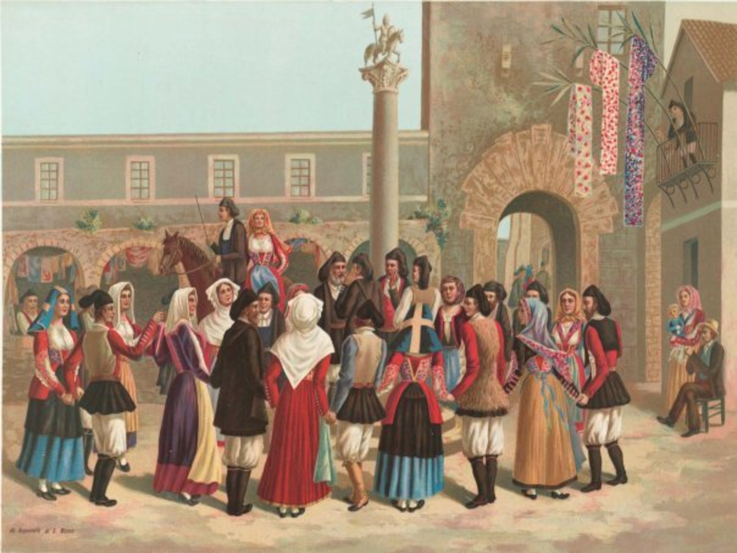 Simone Manca di Mores - "Festa di San Gavino"; metà dell'ottocento (collezione privata).